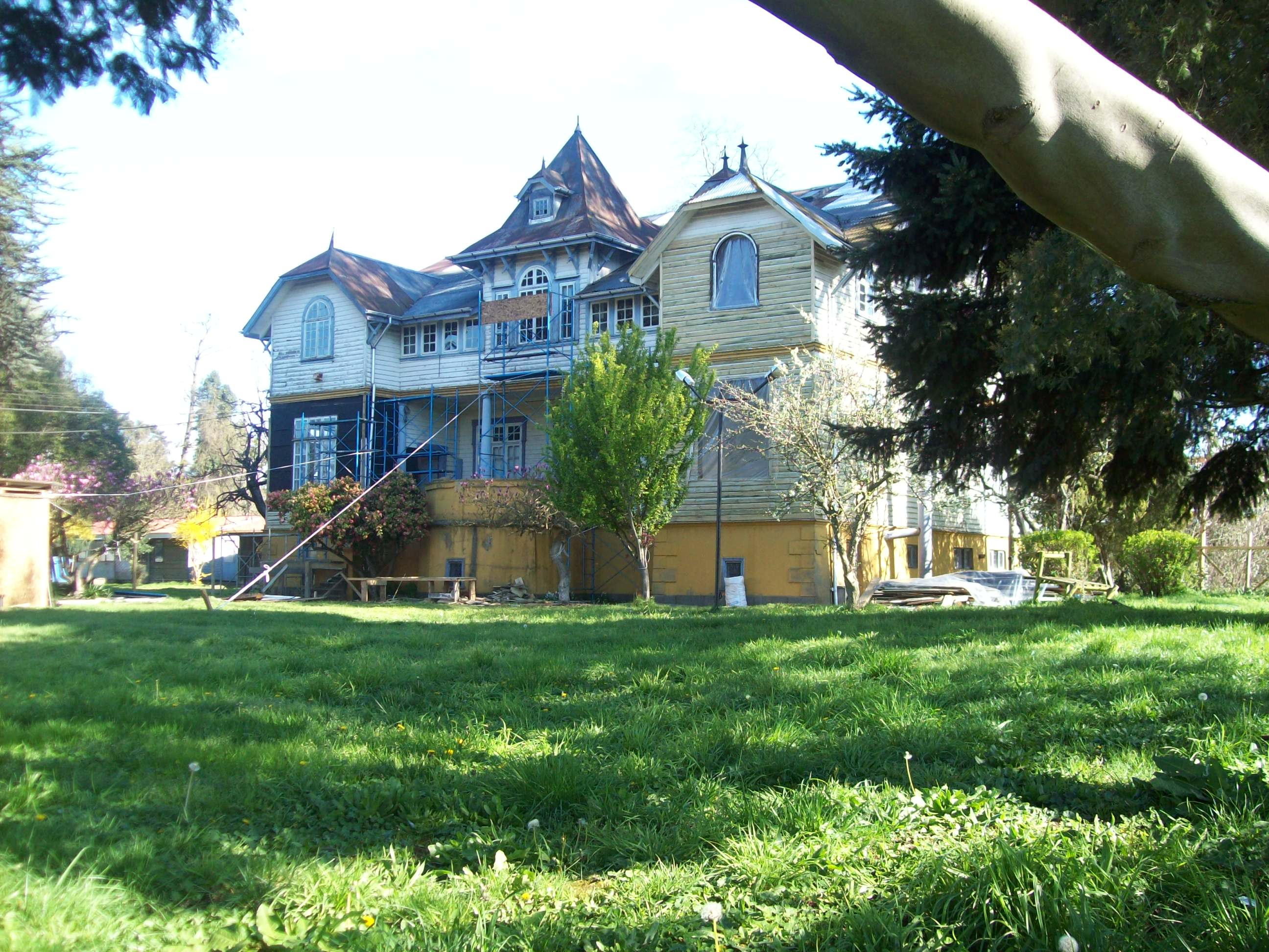 Entorno de la casa Hollstein This is a photo of a national monument in Chile: 736